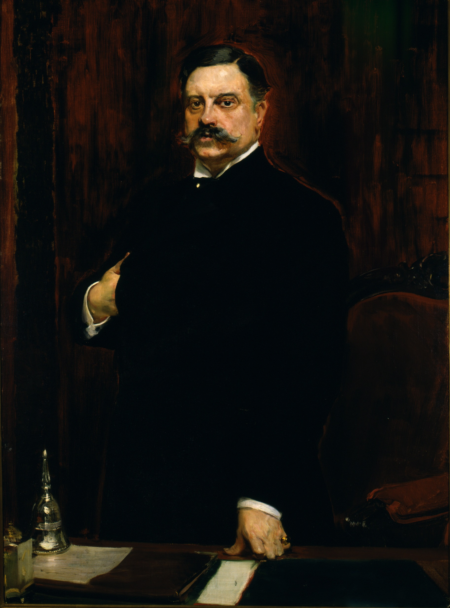 Retrato del político español Raimundo Fernández-Villaverde (1848-1905), que llegó a ser presidente del Consejo de Ministros en 1903, durante el reinado de Alfonso XIII.